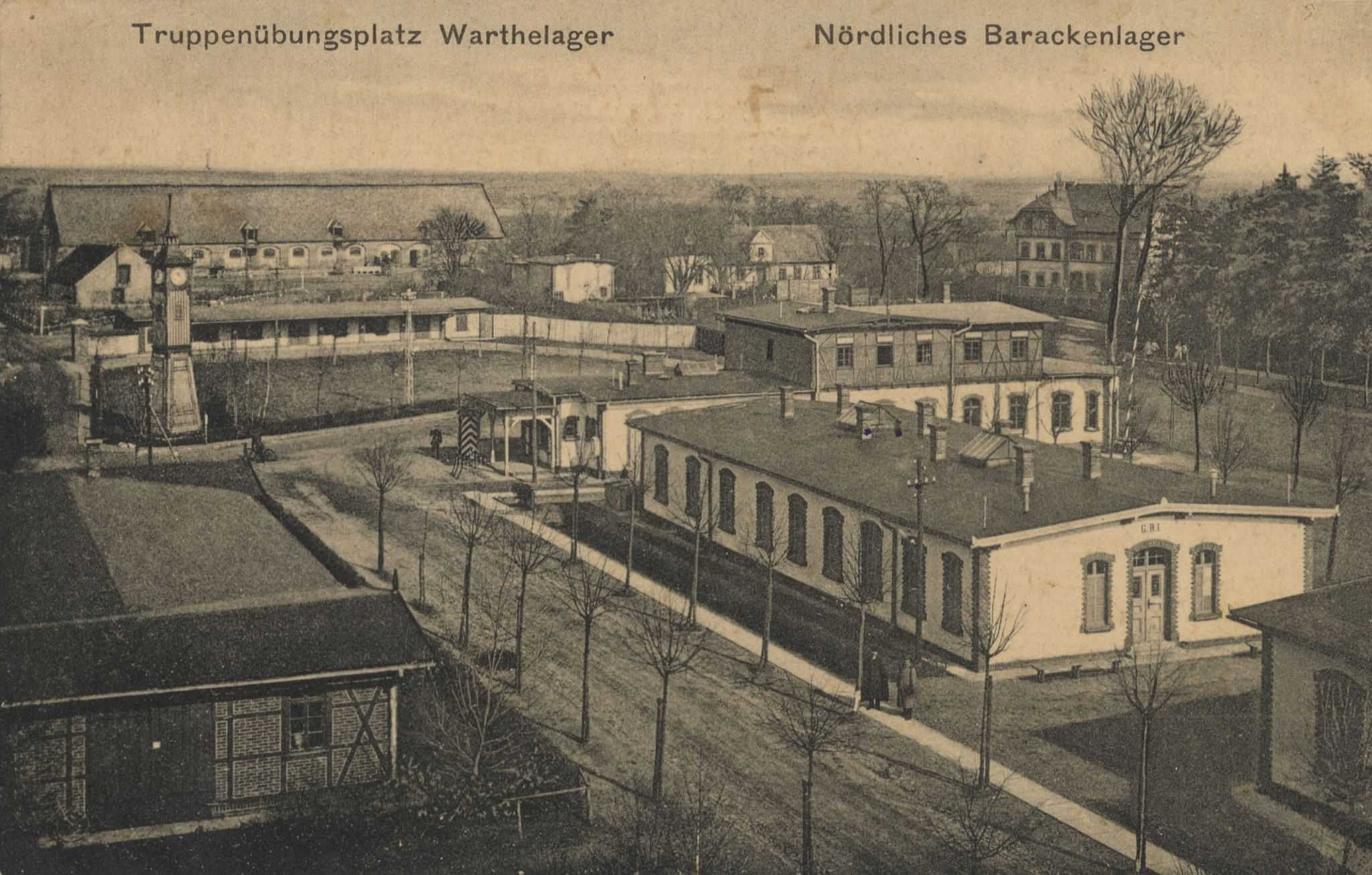 Das nördliche Barackenlager im Warthelager bei Posen, Deutsches Kaiserreich.